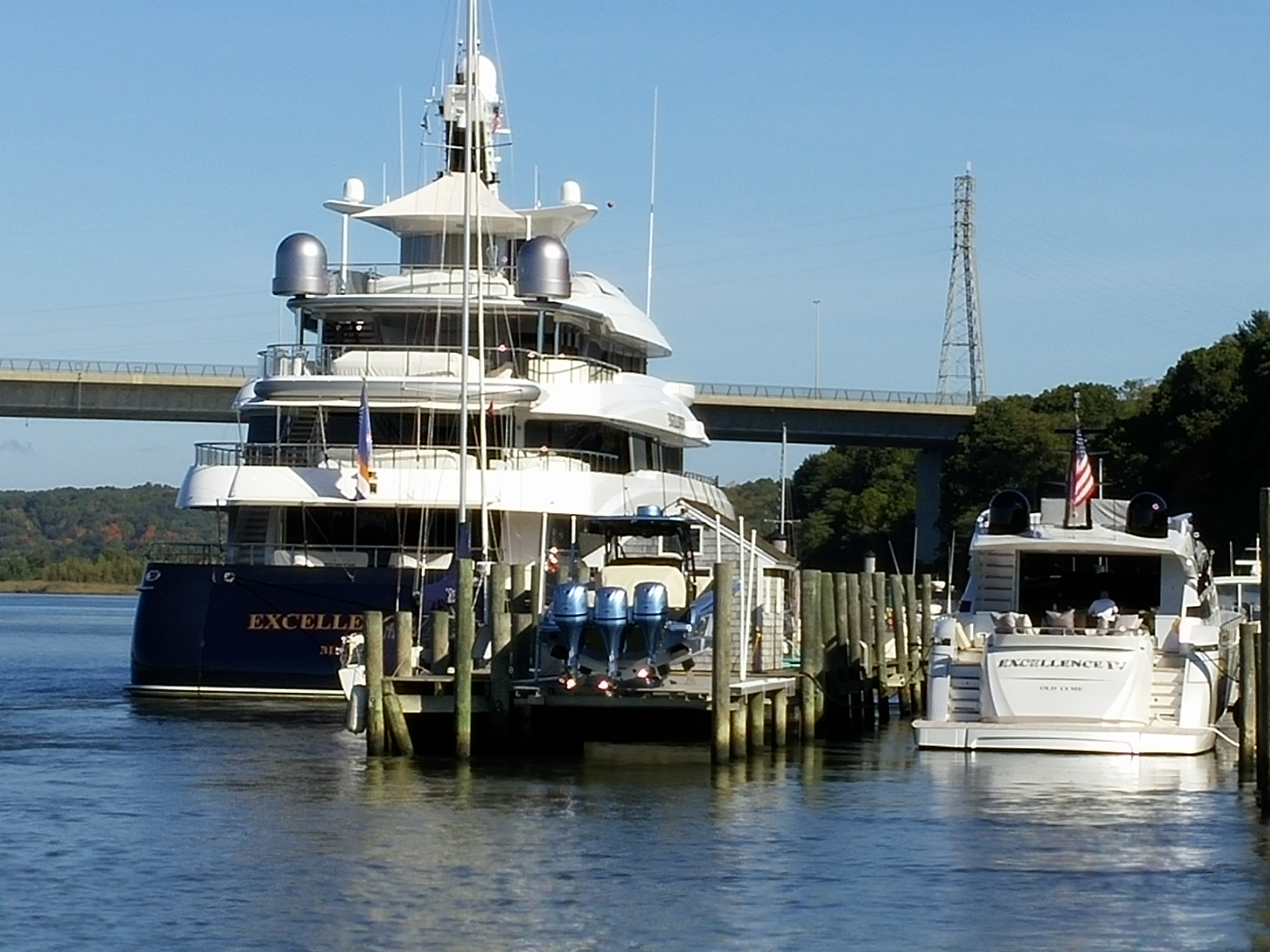 Excellence V